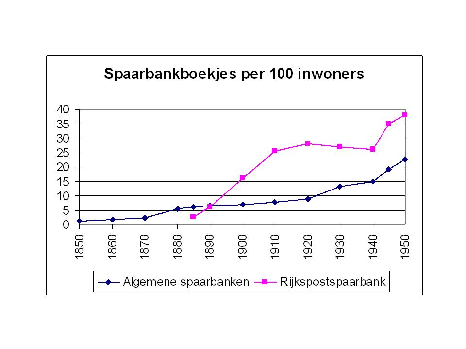 Eigen grafiek